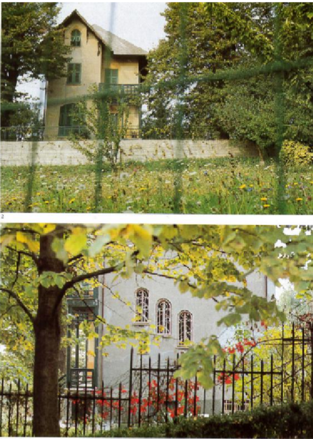 Villa Ida nella frazione Chiesa dei Giovi